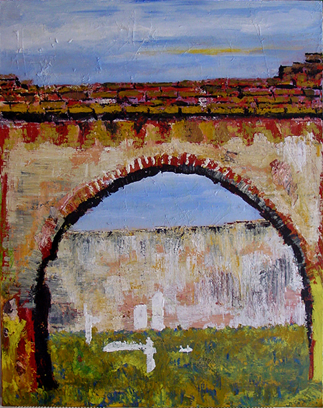 Obra original, Acrílico sobre tabla